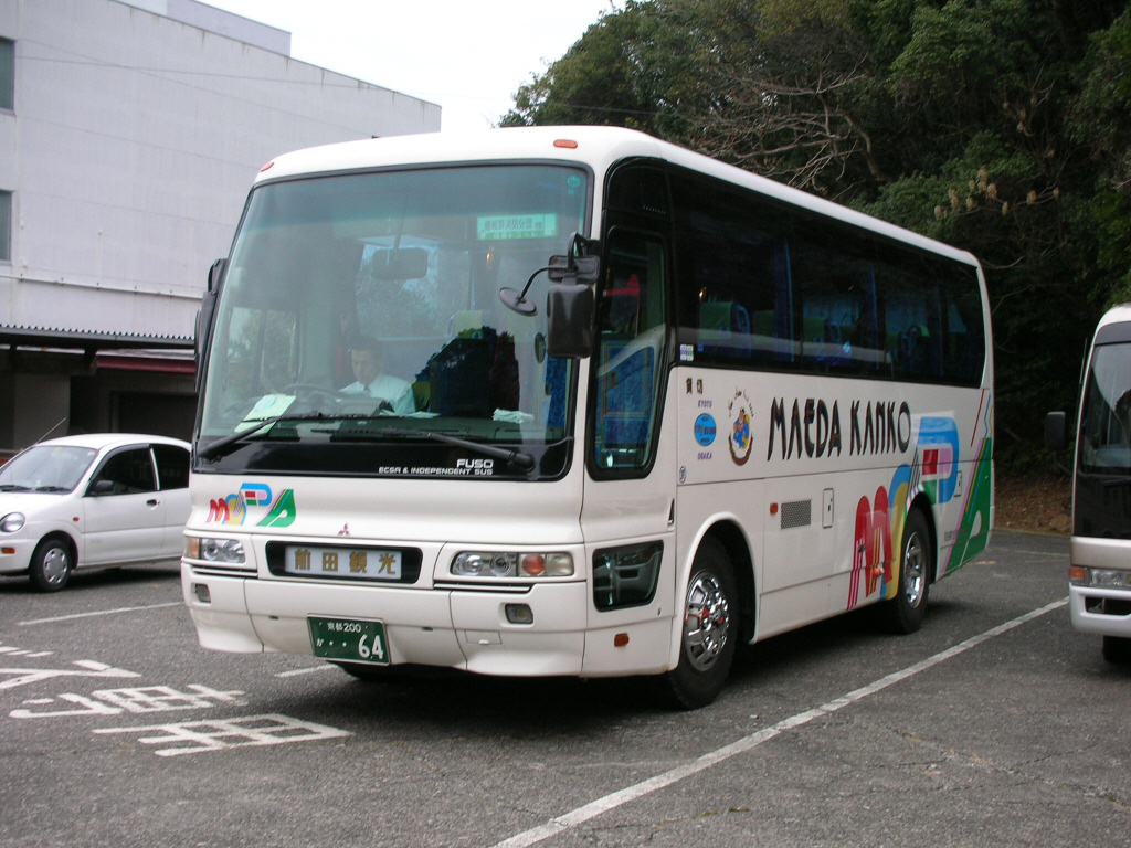 撮影場所失念